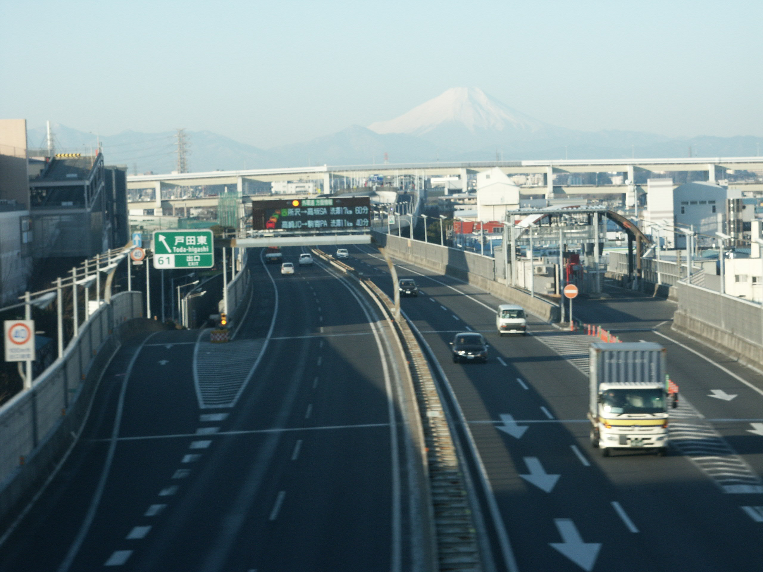 東京外環自動車道戸田東インターチェンジ（内回り出口付近と外回り入口合流付近を撮影）